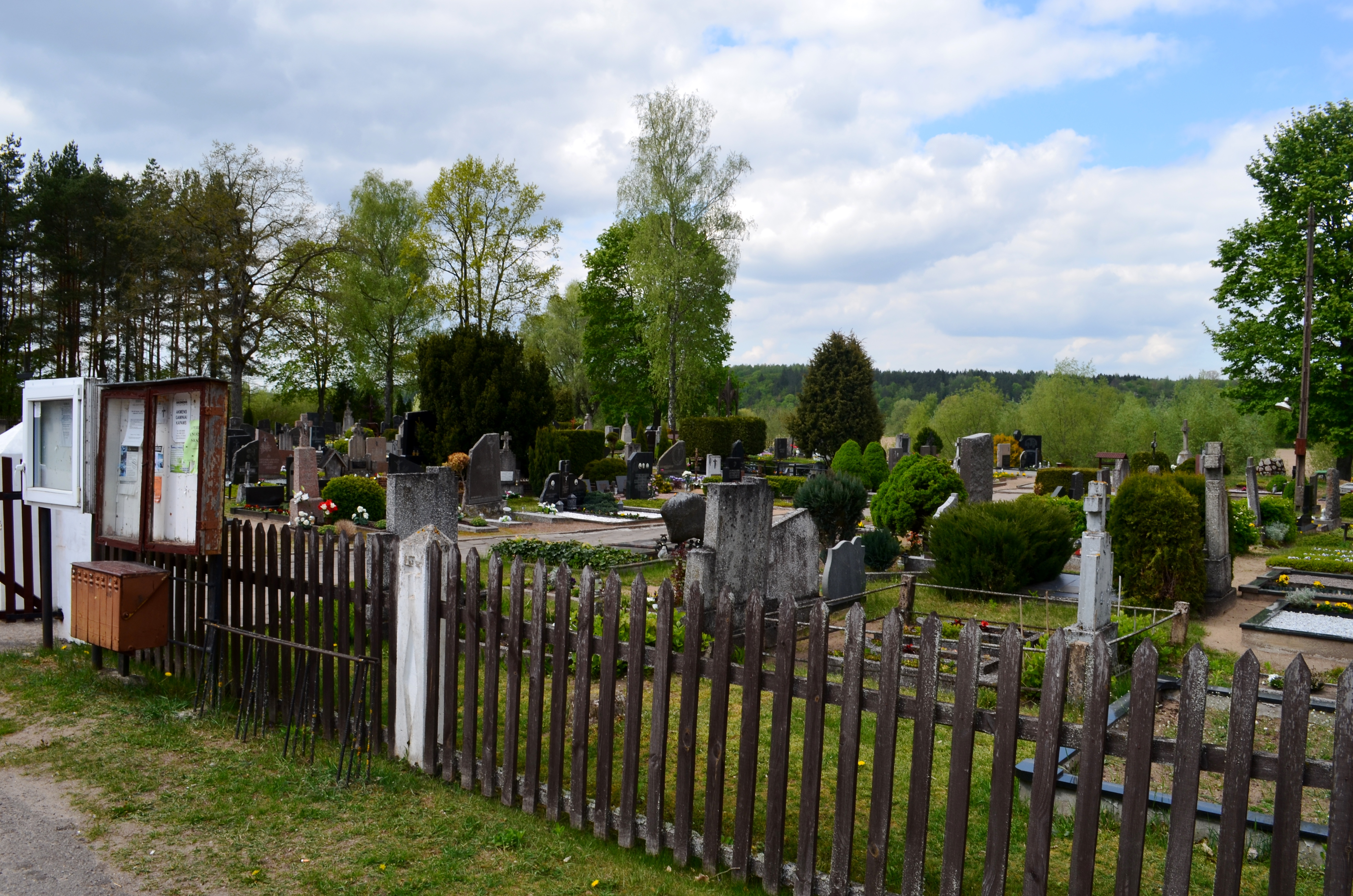 Paežerėlių kapinės, Šakių raj.